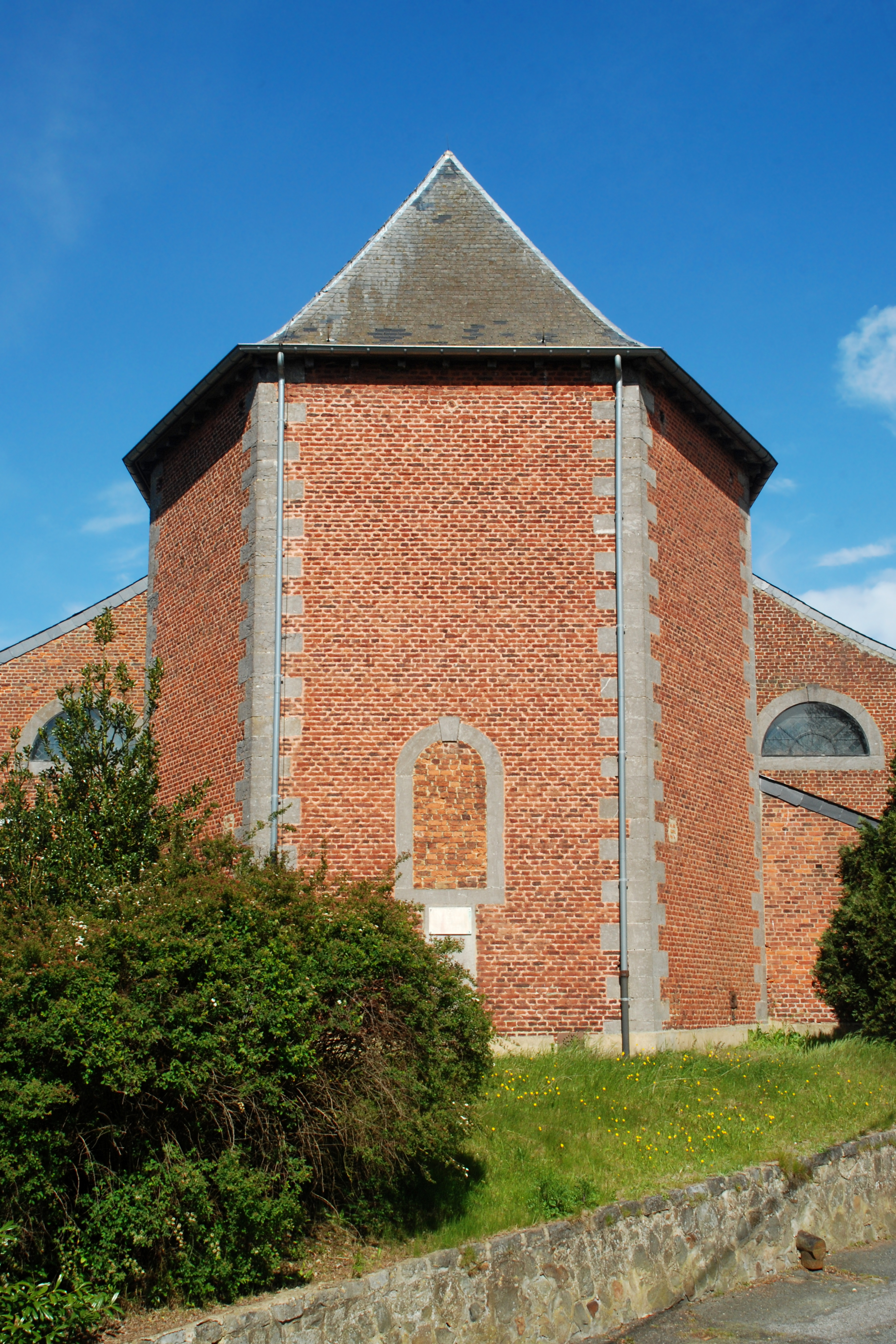 Belgique - Brabant wallon - Hévillers - Église Sainte-Gertrude